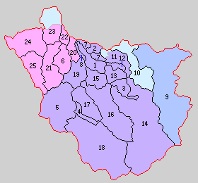 秋田県雄勝郡の町村。